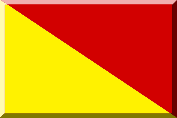 Rosso Giallo diagonale